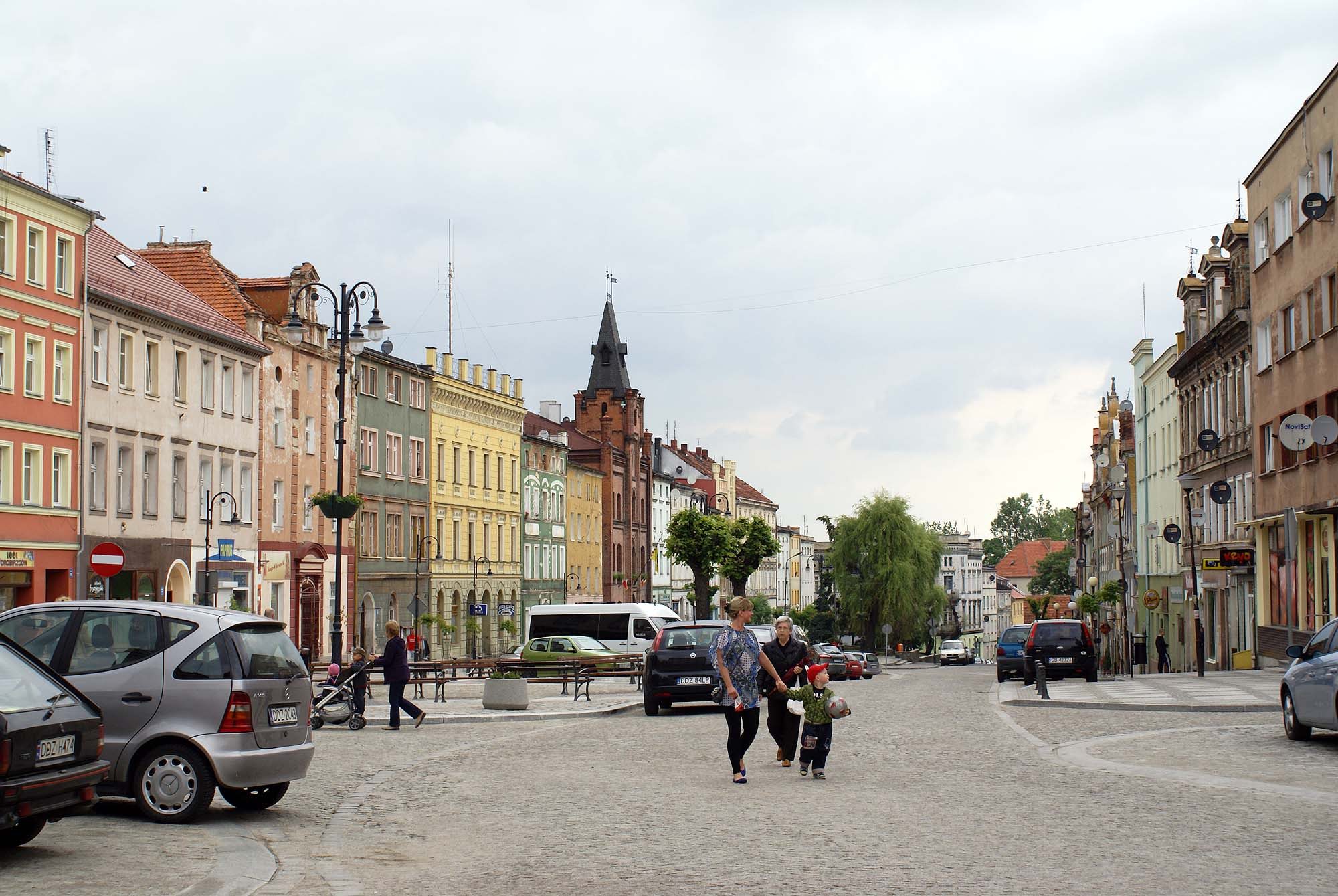 Niemcza, ośrodek historyczny miasta